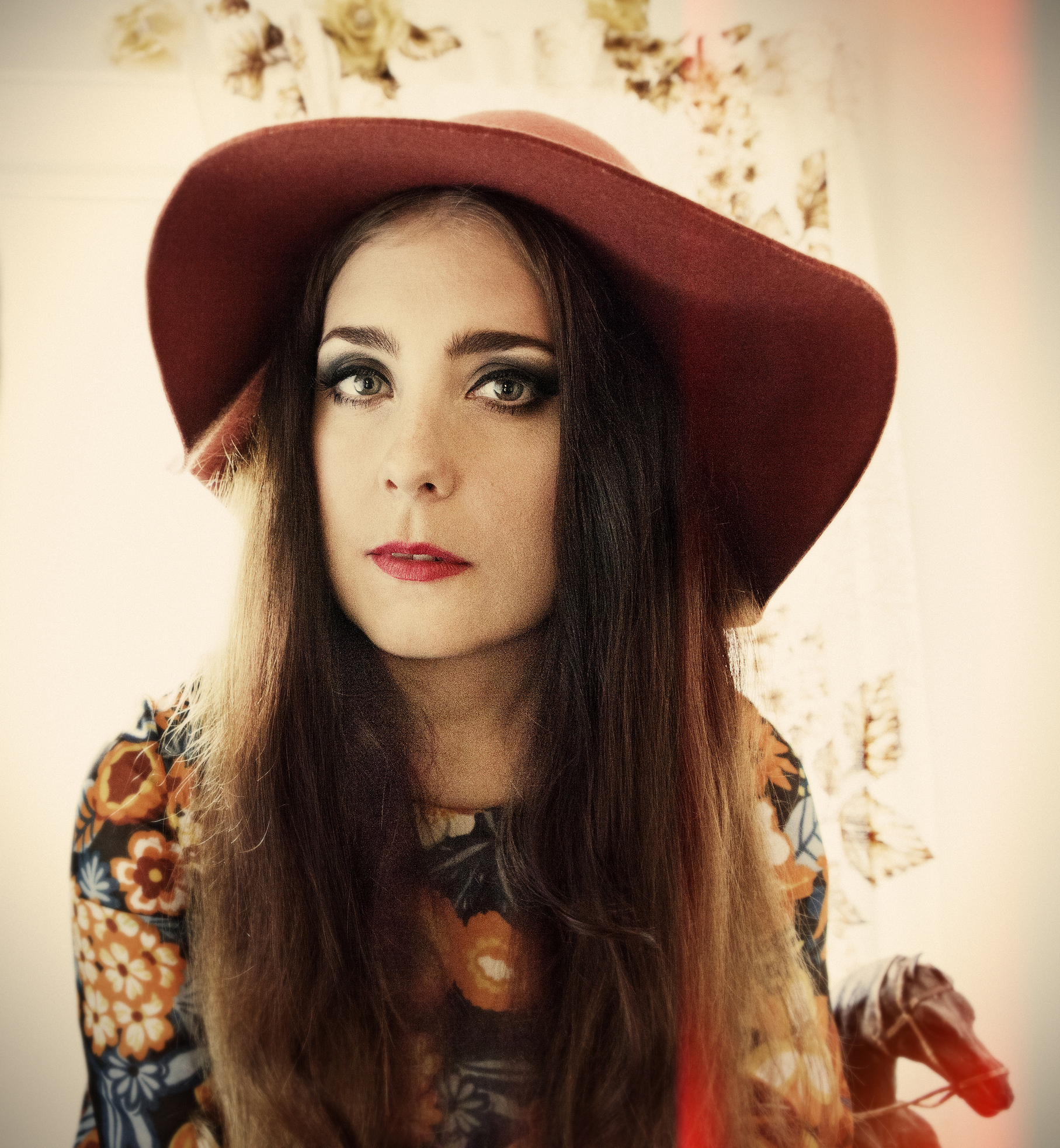 Artisten Miss Li.